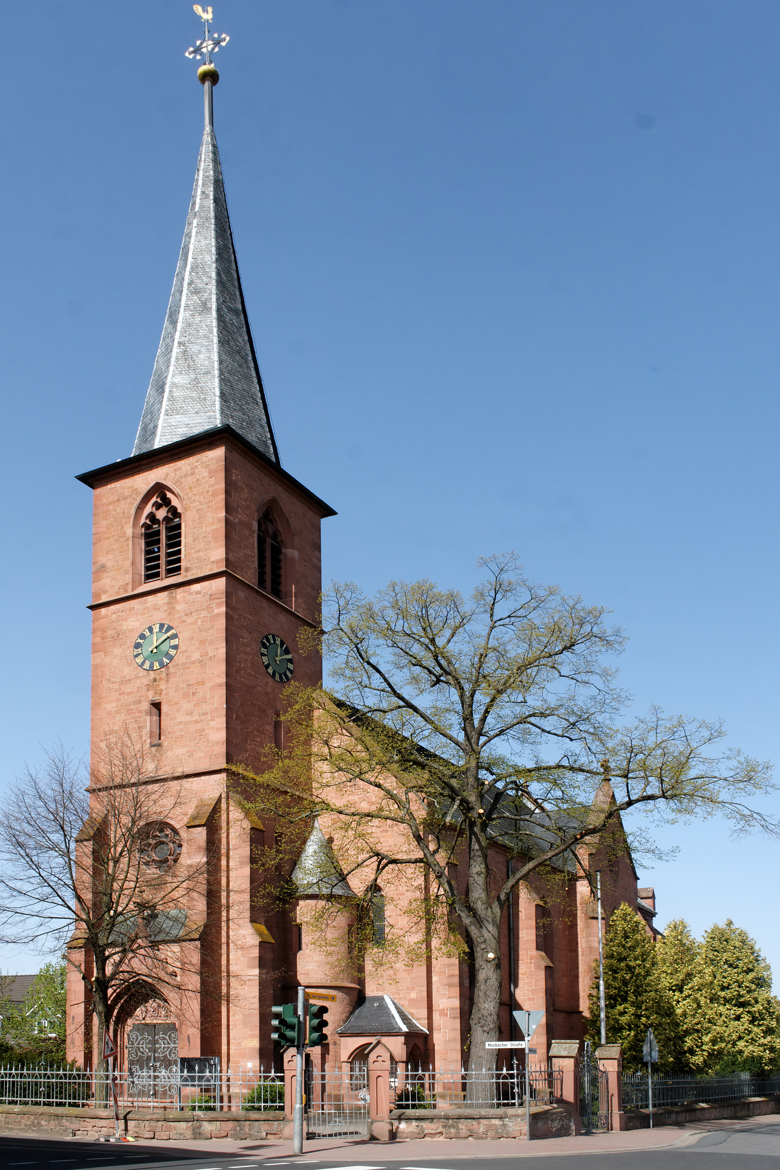 Kirche St. Sebastian in Wenigumstadt, Markt Großostheim (Bayern).